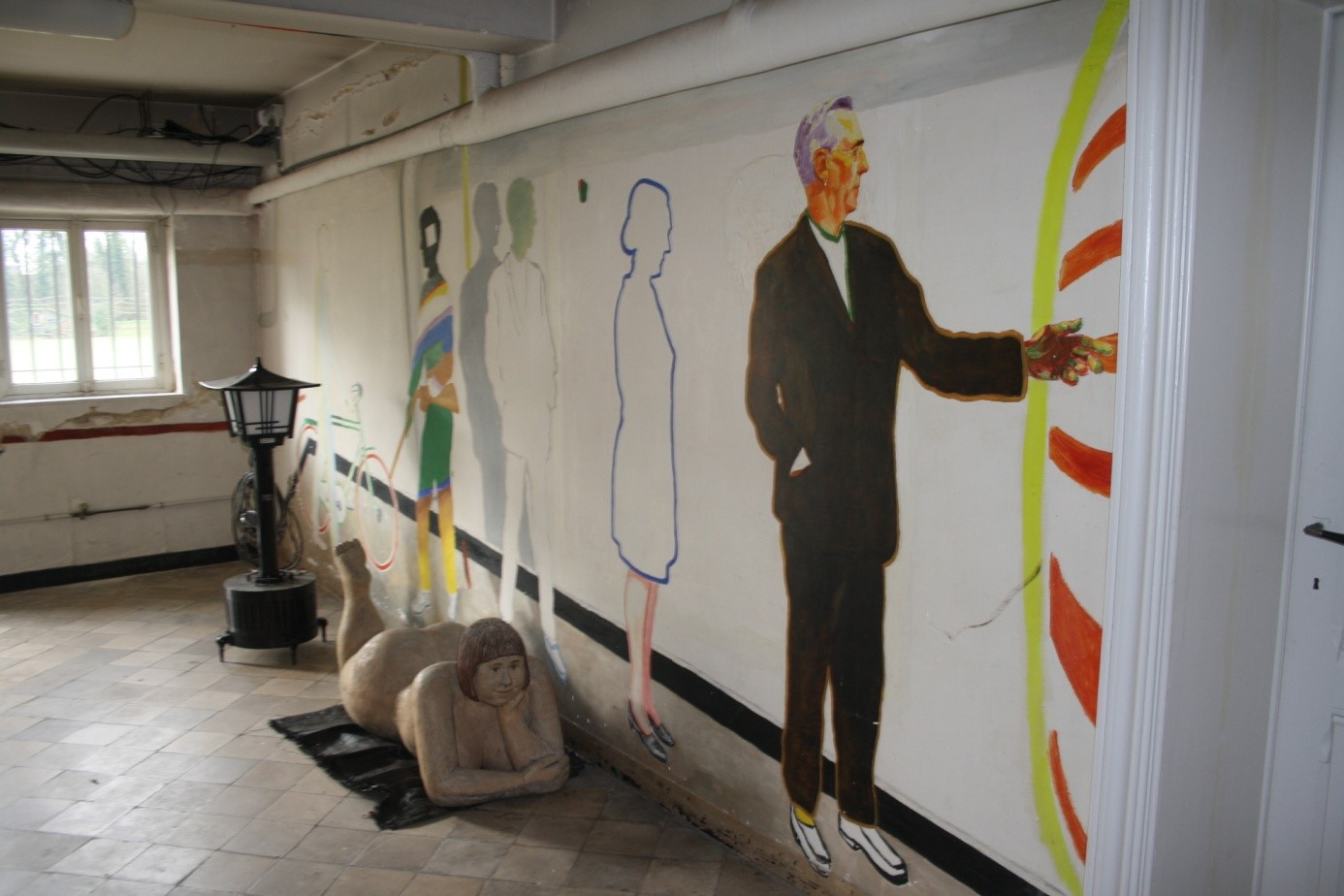 Raveel betrekt zijn omgeving in het schilderij.